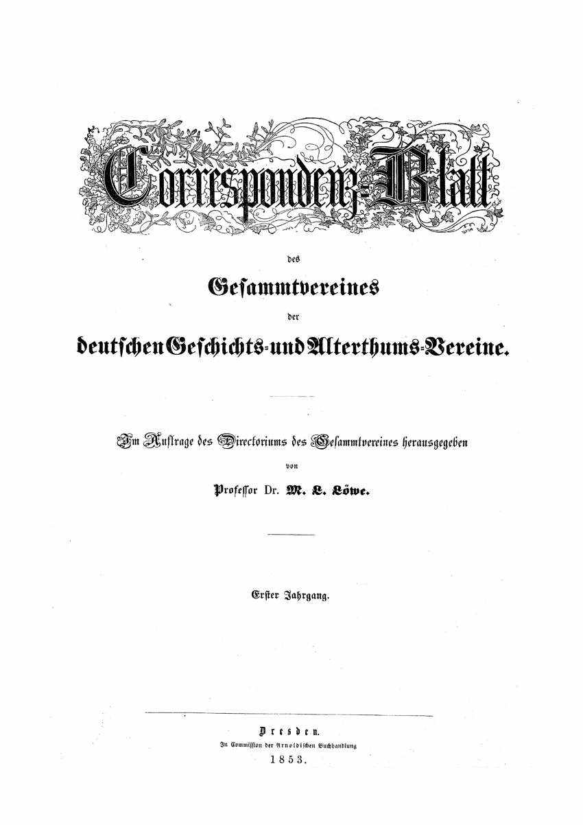 Titelseite des "Korrespondenzblattes des Gesamtvereins der Deutschen Geschichts- und Alterthumsvereine" von 1852. Die Zeitschrift firmiert seit 1937 unter dem Titel "Blätter für deutsche Landesgeschichte"